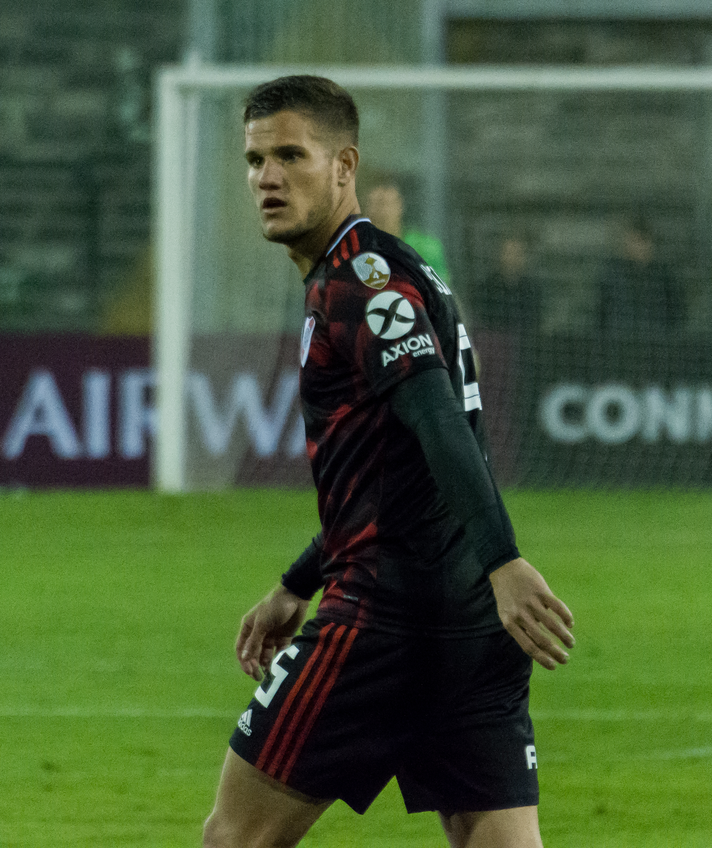 Palestino v River Plate, Estadio Monumental, Macul, Santiago, Región Metropolitana, Chile.